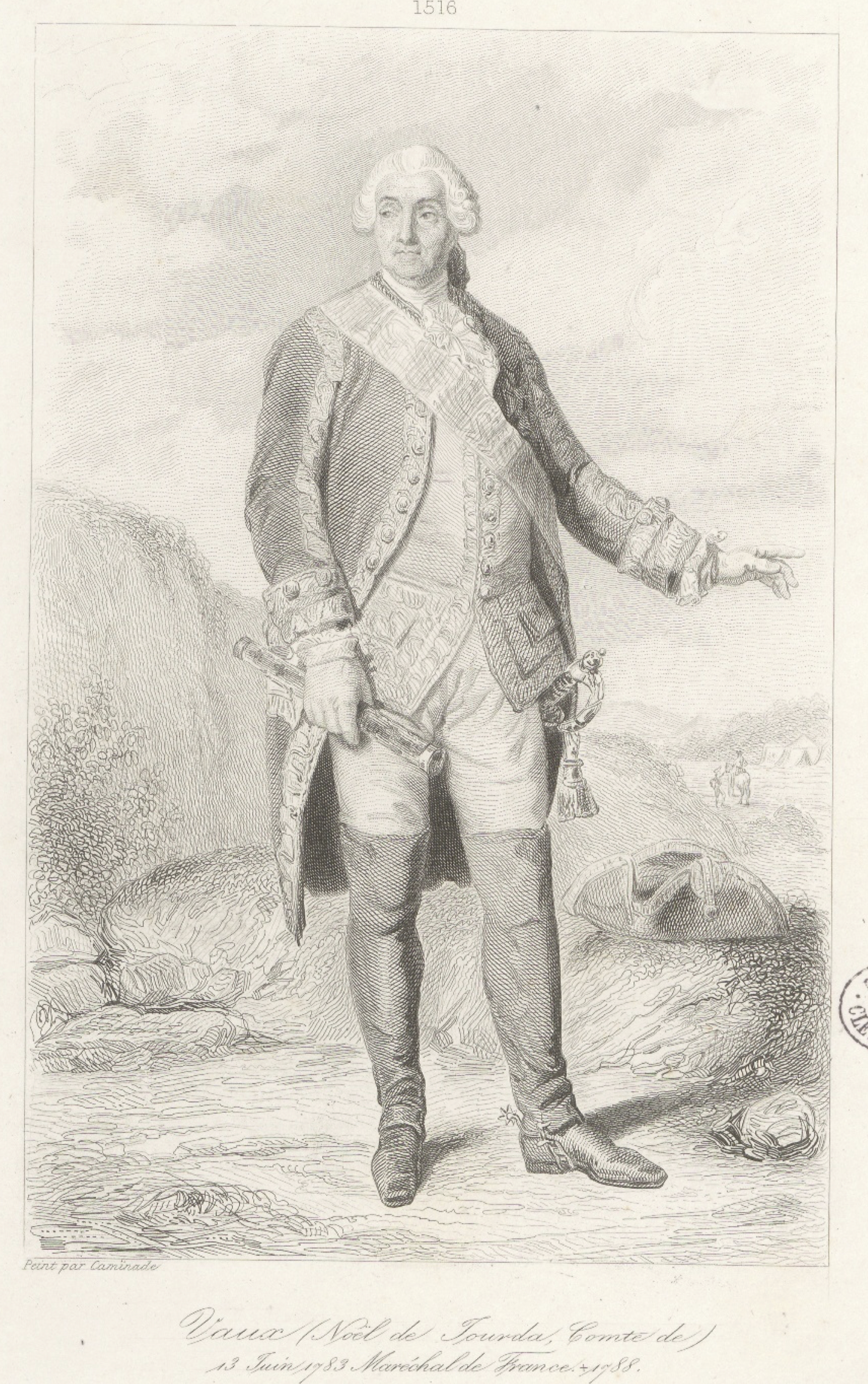 Extrait des Galeries historiques de Versailles de Charles Gavard ; Portrait de Noël de Jourda (1705-1788), comte de Vaux, seigneur d'Artias, maréchal de France, né au château de Vaux à Saint-Julien-du-Pinet (Haute-Loire)